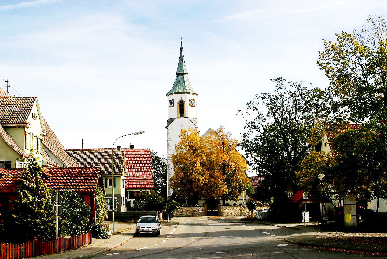 Ostdorf Town Center - Ostdorf, Balingen, Baden-Wuettemberg, Germany